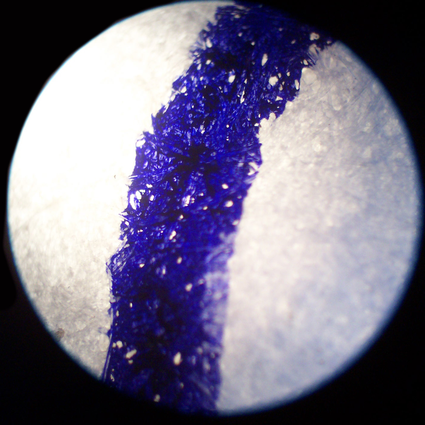 Tintenstrich eines Füllers bei ca. 50-facher Vergrößerung.